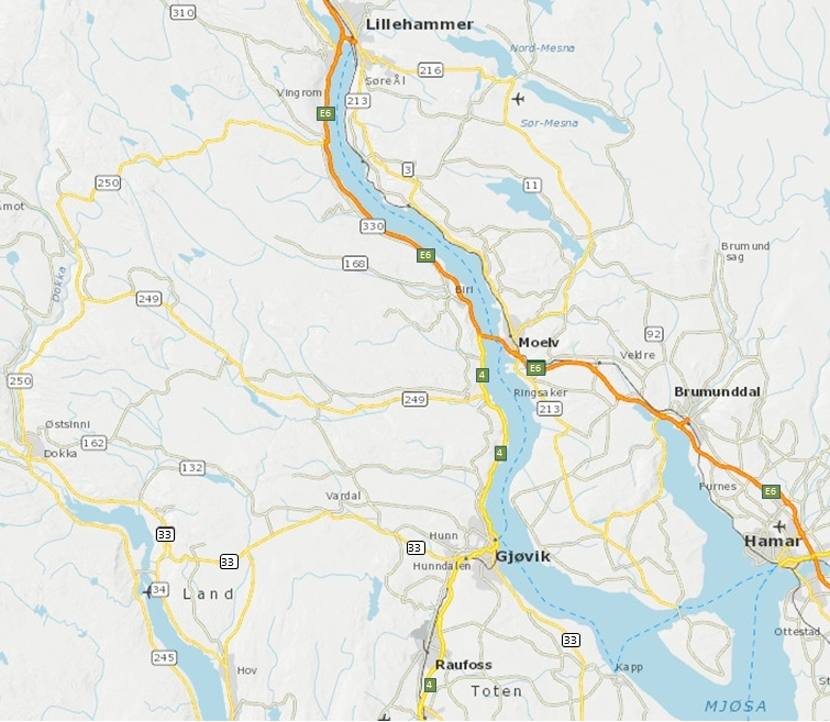 Hovedveier gjennom Gjøvik kommune